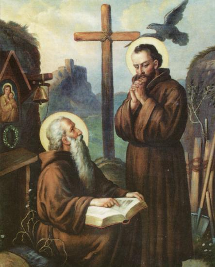 Andachtsbild: Andreas (Zoërard, Swierad, en: Svorad) mit seinem Schüler Benedikt.